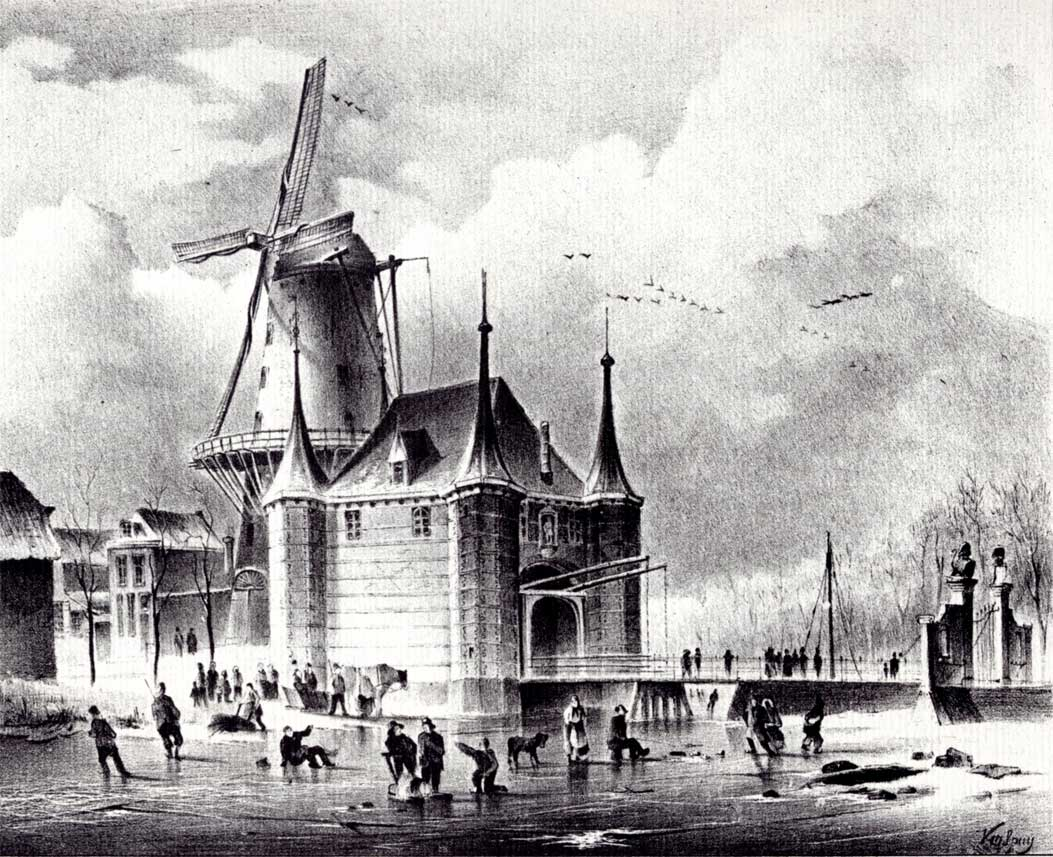 Gezicht op de Kleiwegspoort te Gouda bij winter - lithografie